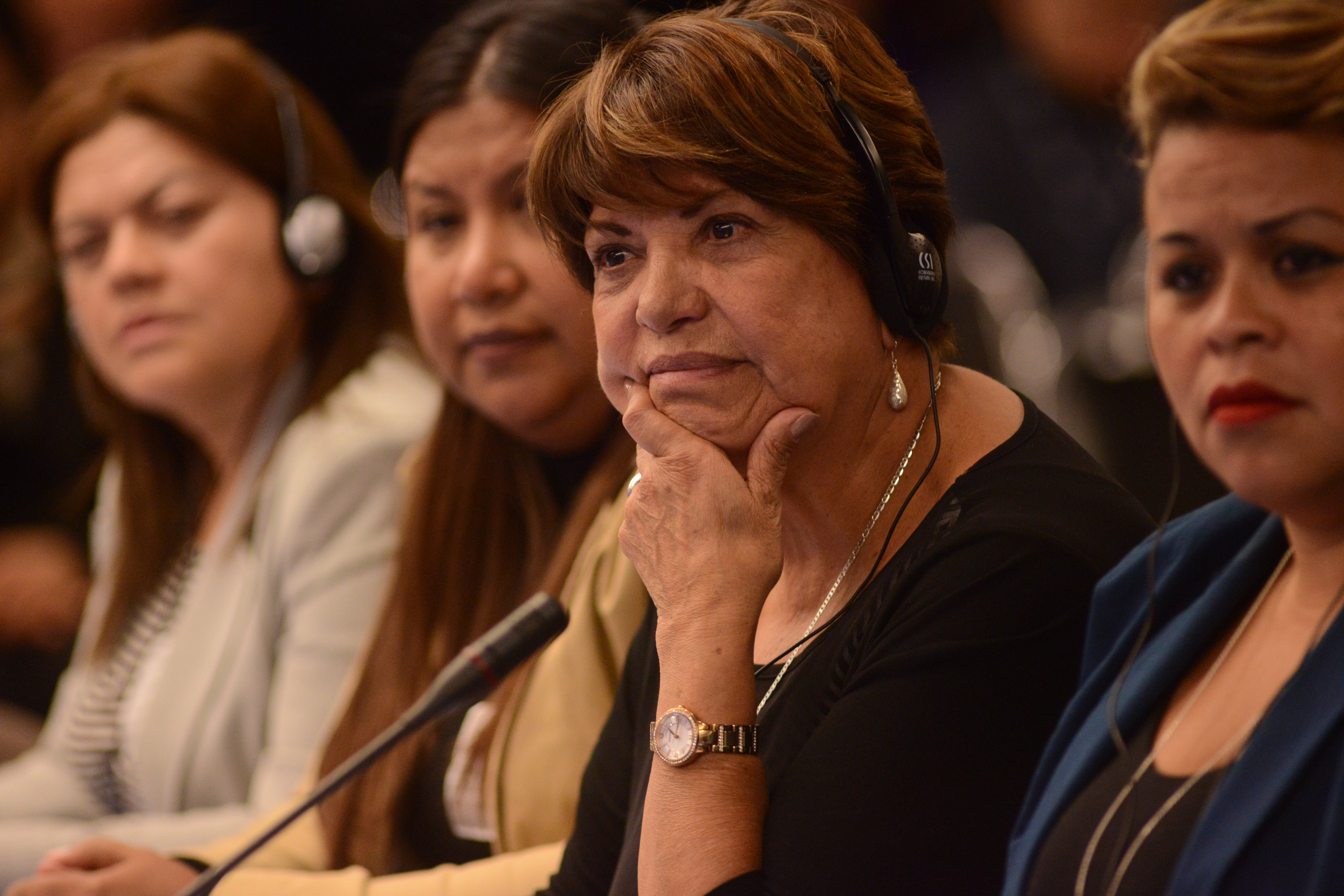 161 Periodo de Sesiones Sábado 18 de marzo de 2017 Peticionaria: Elena Reynaga, Red de Trabajadoras Sexuales Foto: Daniel Cima/CIDH